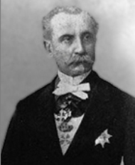 Antonio Winspeare, Duca di Salve, sindaco di Napoli, prefetto di Lecce, Torino, Milano, Venezia, Firenze (1822 – 1918).